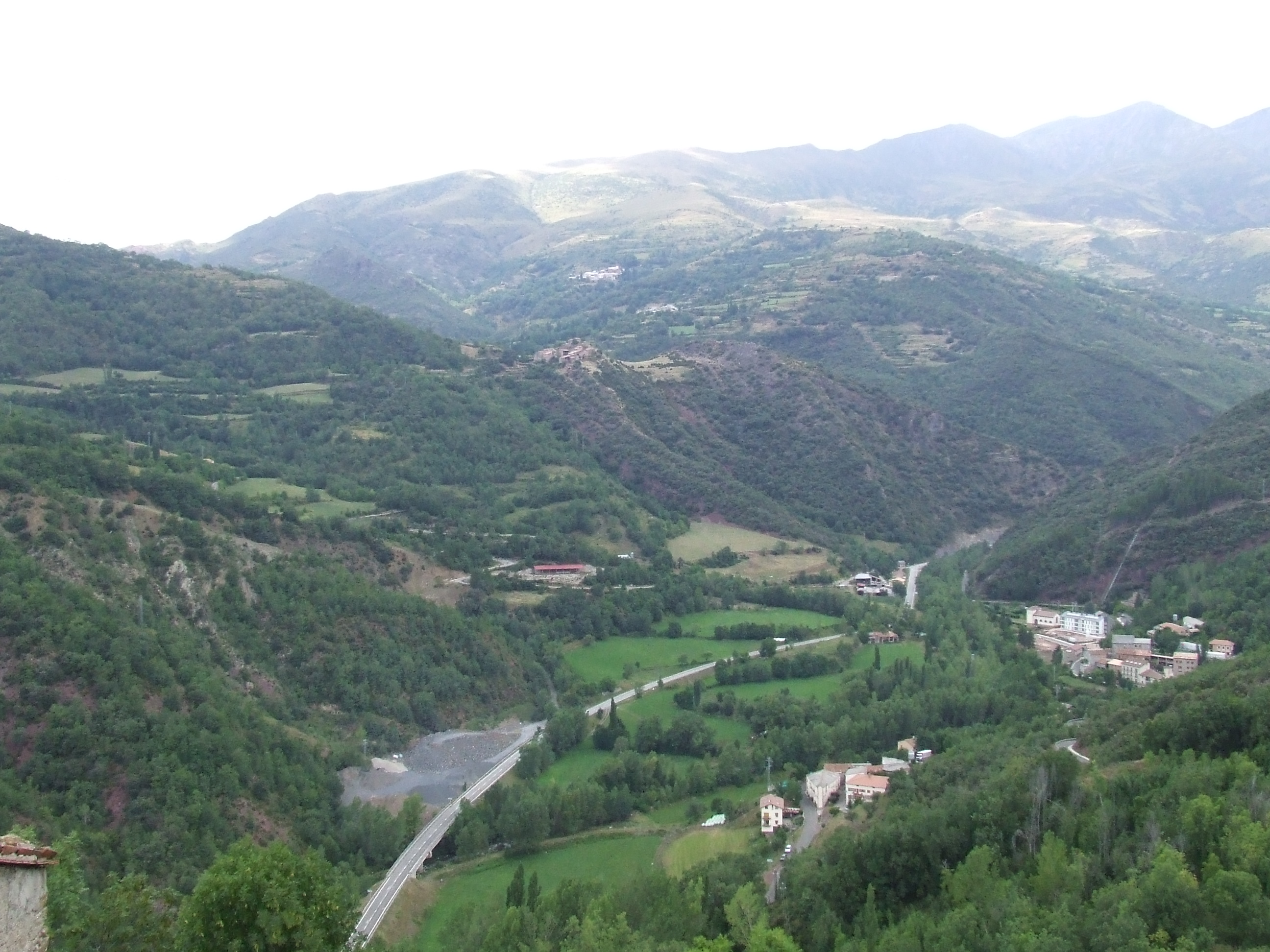 La L-503 a la Vall Fosca (Mont-ros, la Torre de Cabdella, Pallars Jussà)